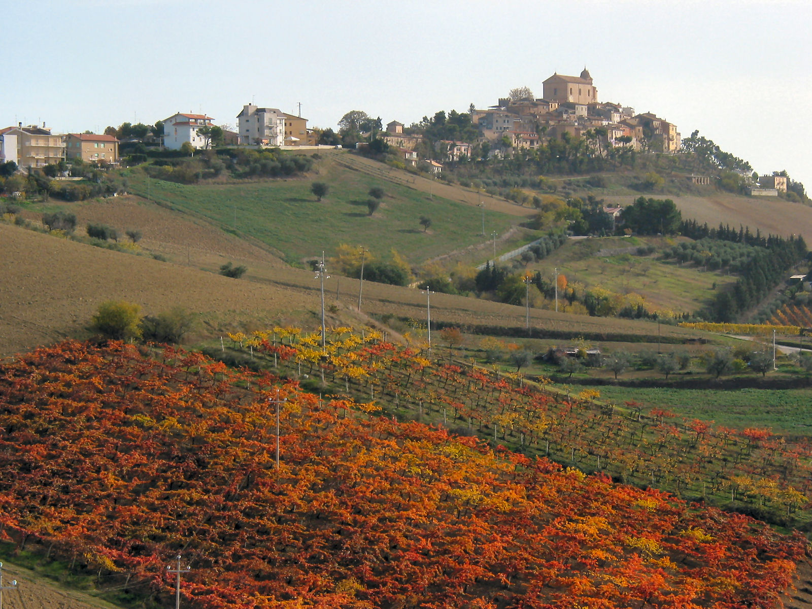 Nice autumn/fall outside Monteprandone